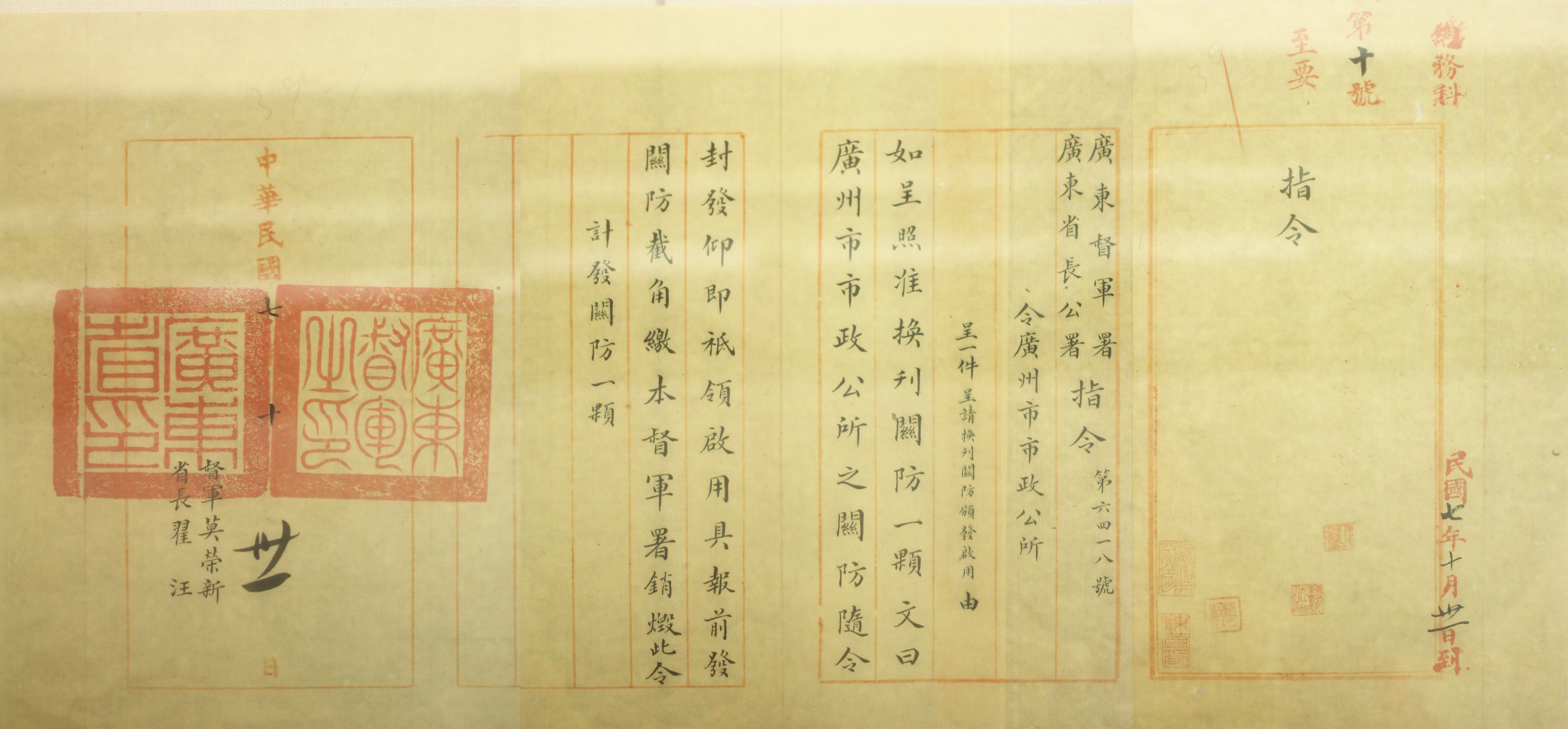 廣州市市政公所啟用關防的指令。中華民國七年十月三十一日。